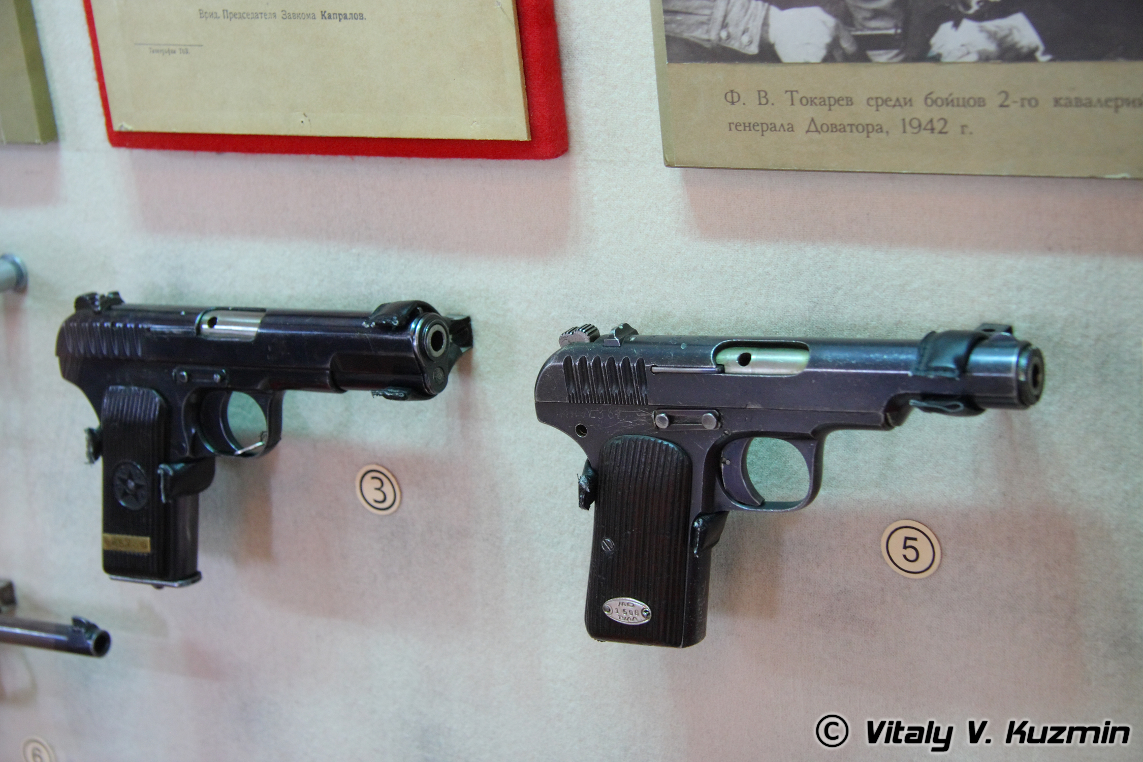 ТТ и опытный образец ТТ 1930г. (TT and experimental model TT 1930 year)